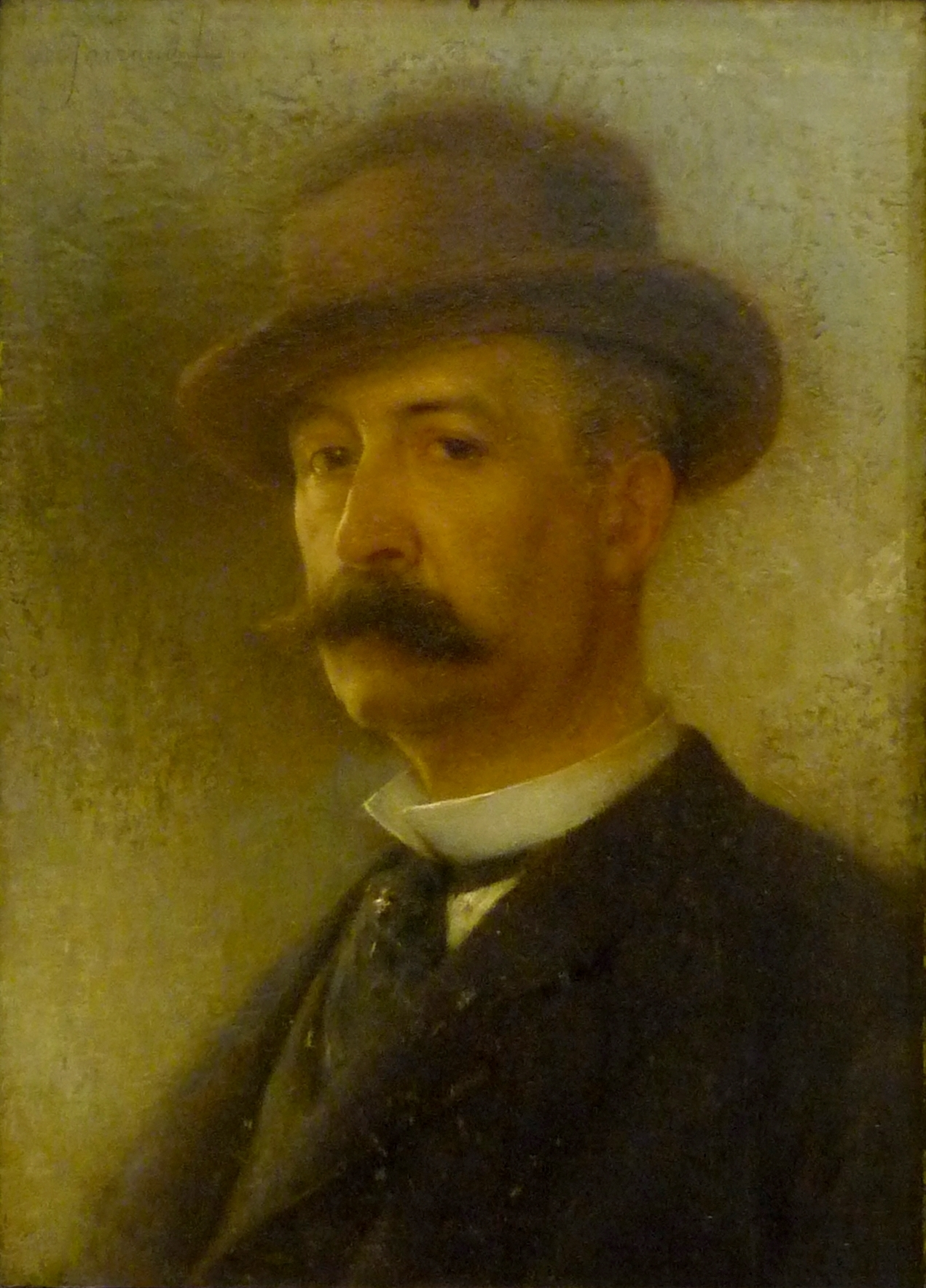 Léonard Jarraud : Portrait de M. Donzole (55 x 37,3 cm), 1887. Musée d'Angoulême, Charente (France).